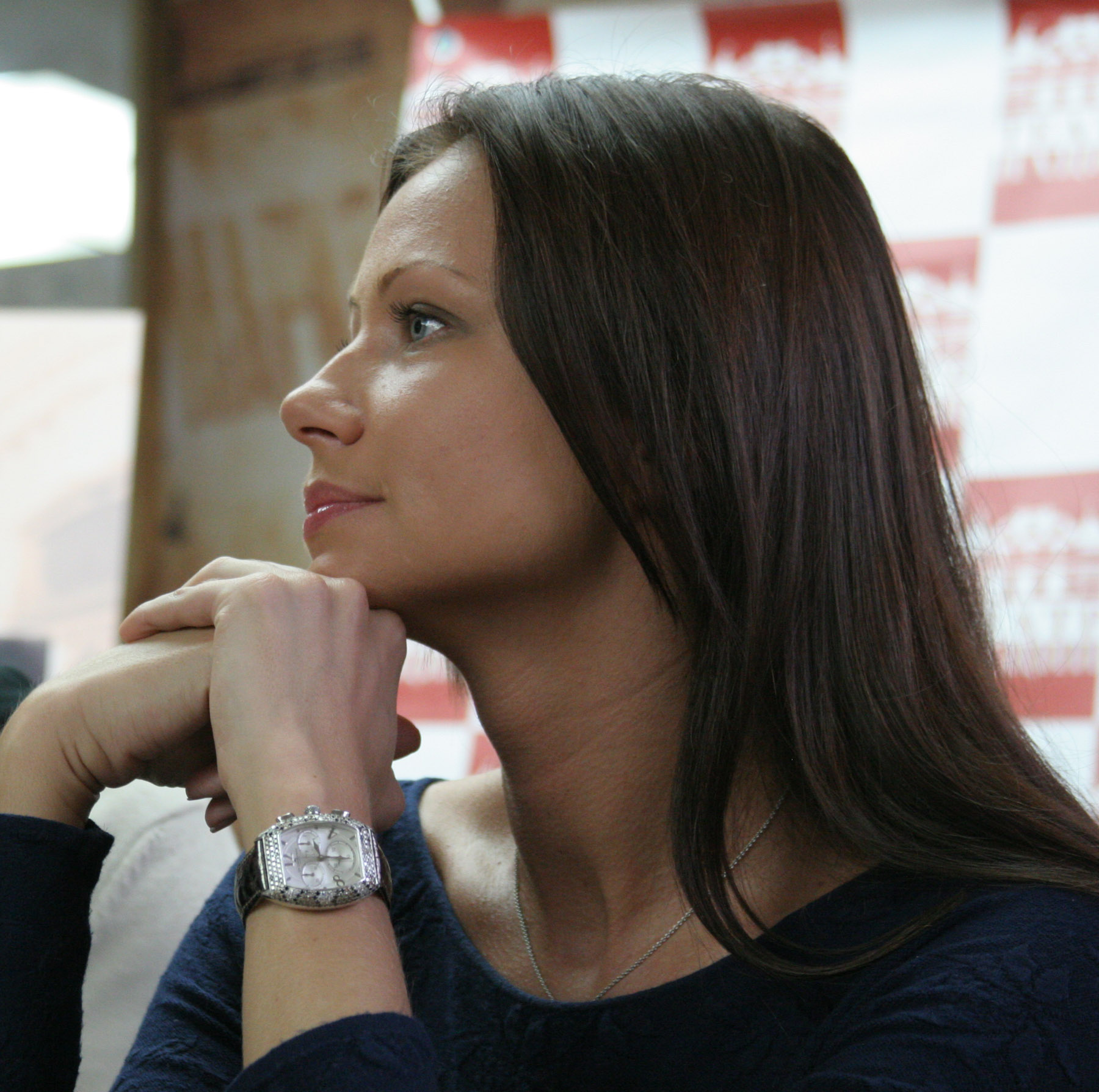 Мария Миронова на пресс-конференции в Саратовском театре драмы